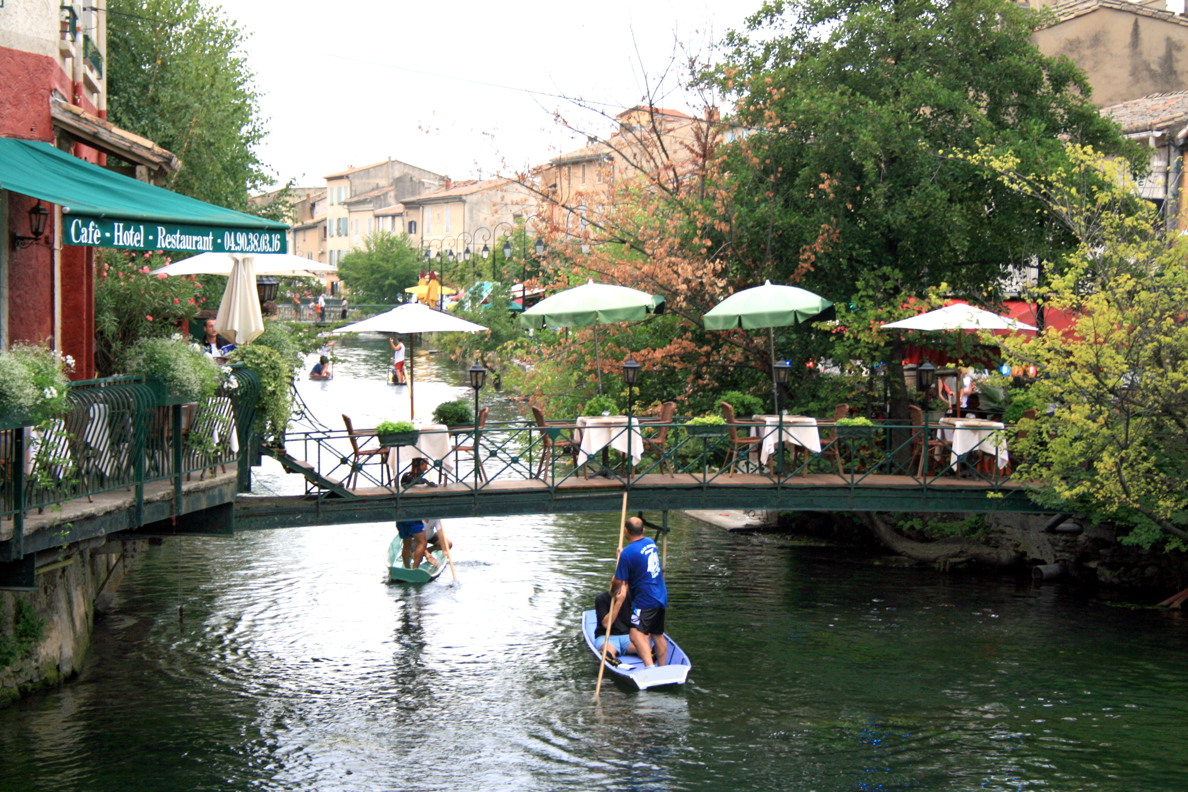 L'Isle-sur-la-Sorgue. Nego-chin : barque à fond plat